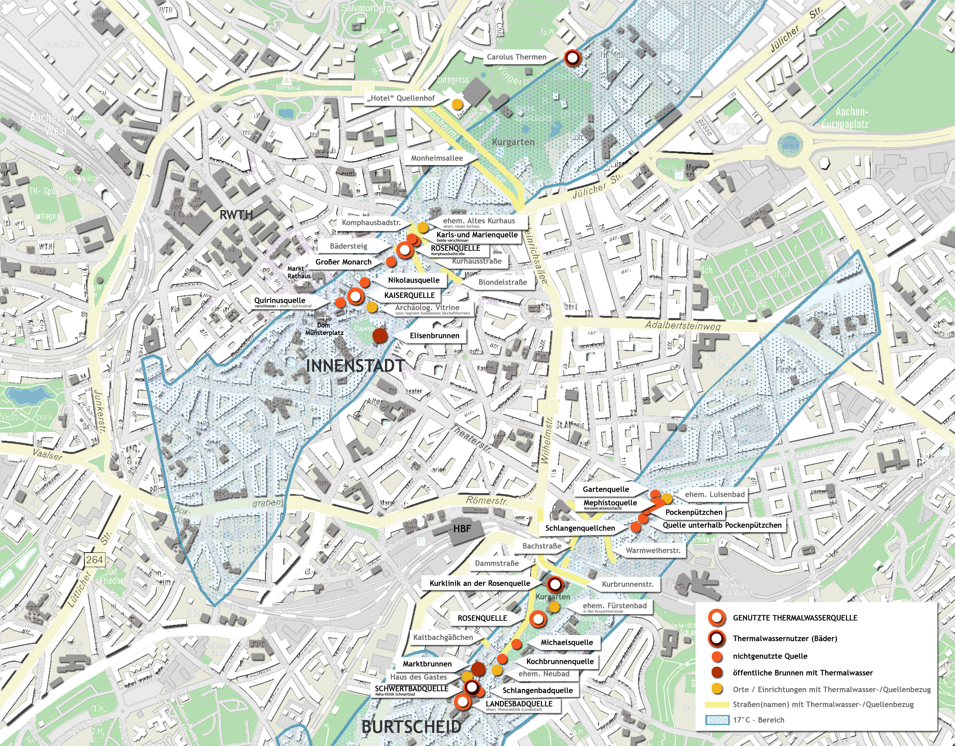 Lageplan der Aachener und Burtscheider Thermalquellen und Stationen der Thermalwasserroute Aachen